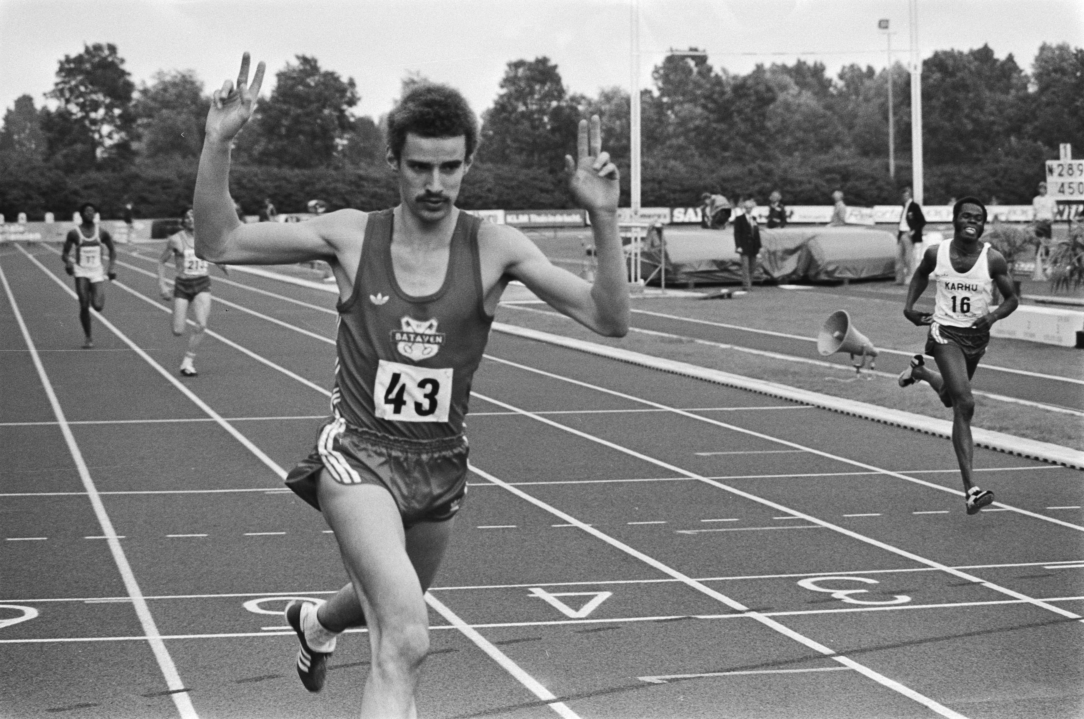 Collectie / Archief : Fotocollectie Anefo Reportage / Serie : [ onbekend ] Beschrijving : Nationale atletiekkampioenschappen Groningen; Koen Gijsbers als eerste op 400 meter Datum : 6 augustus 1978 Locatie : Groningen Trefwoorden : atletiek, kampioenschappen Fotograaf : Verhoeff, Bert / Anefo Auteursrechthebbende : Nationaal Archief Materiaalsoort : Negatief (zwart/wit) Nummer archiefinventaris : bekijk toegang 2.24.01.05 Bestanddeelnummer : 929-8444